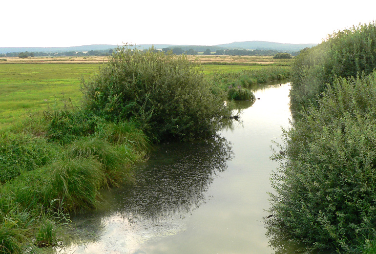 Meerbach im Meerbruch; NSG Meerbruchswiesen mit Steinhuder Meerbach